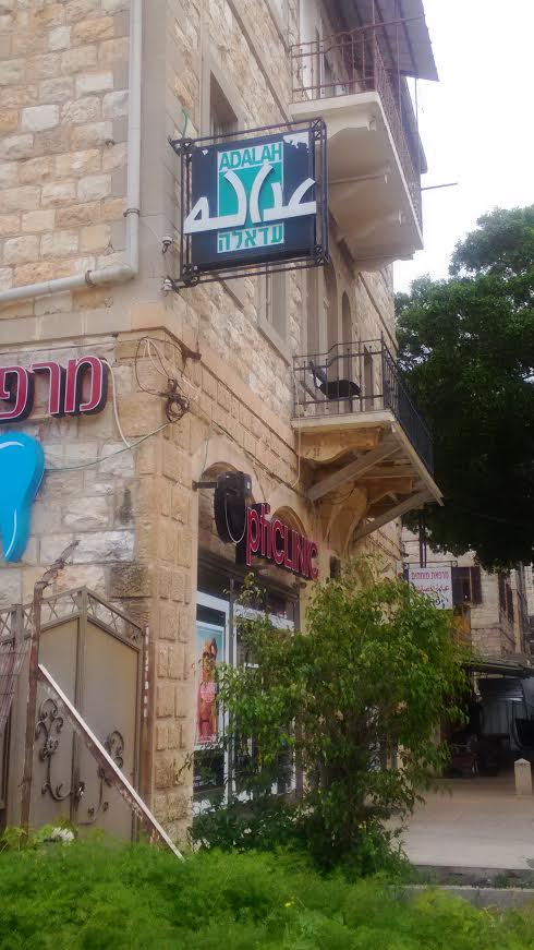 משרדי הארגון בחיפה